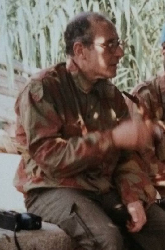 Vittorio Castellani all'uscita del cunicolo di Nemi